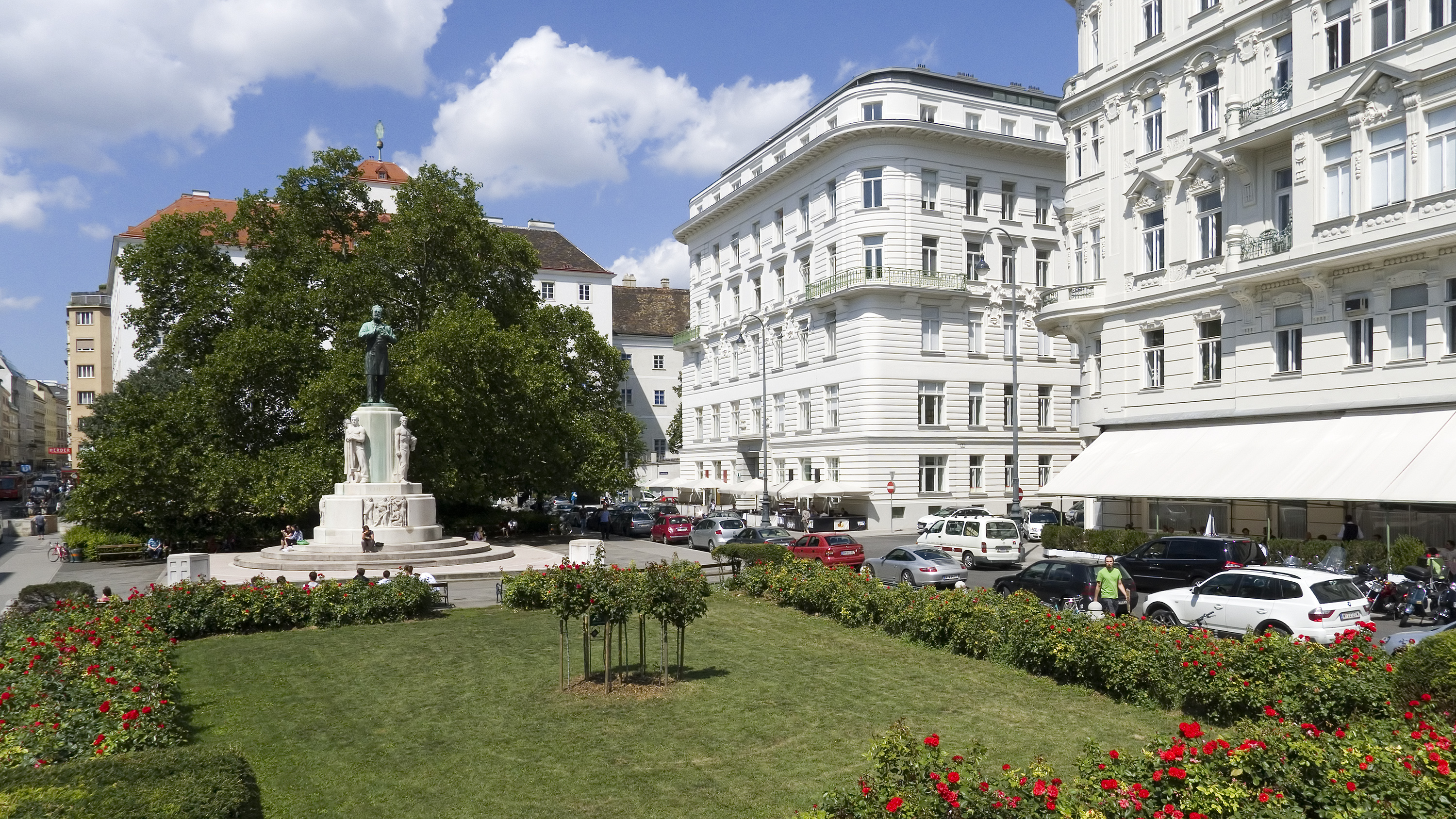 Dr.-Karl-Lueger-Platz in Wien 1 beim Parkring Richtung Nordwesten